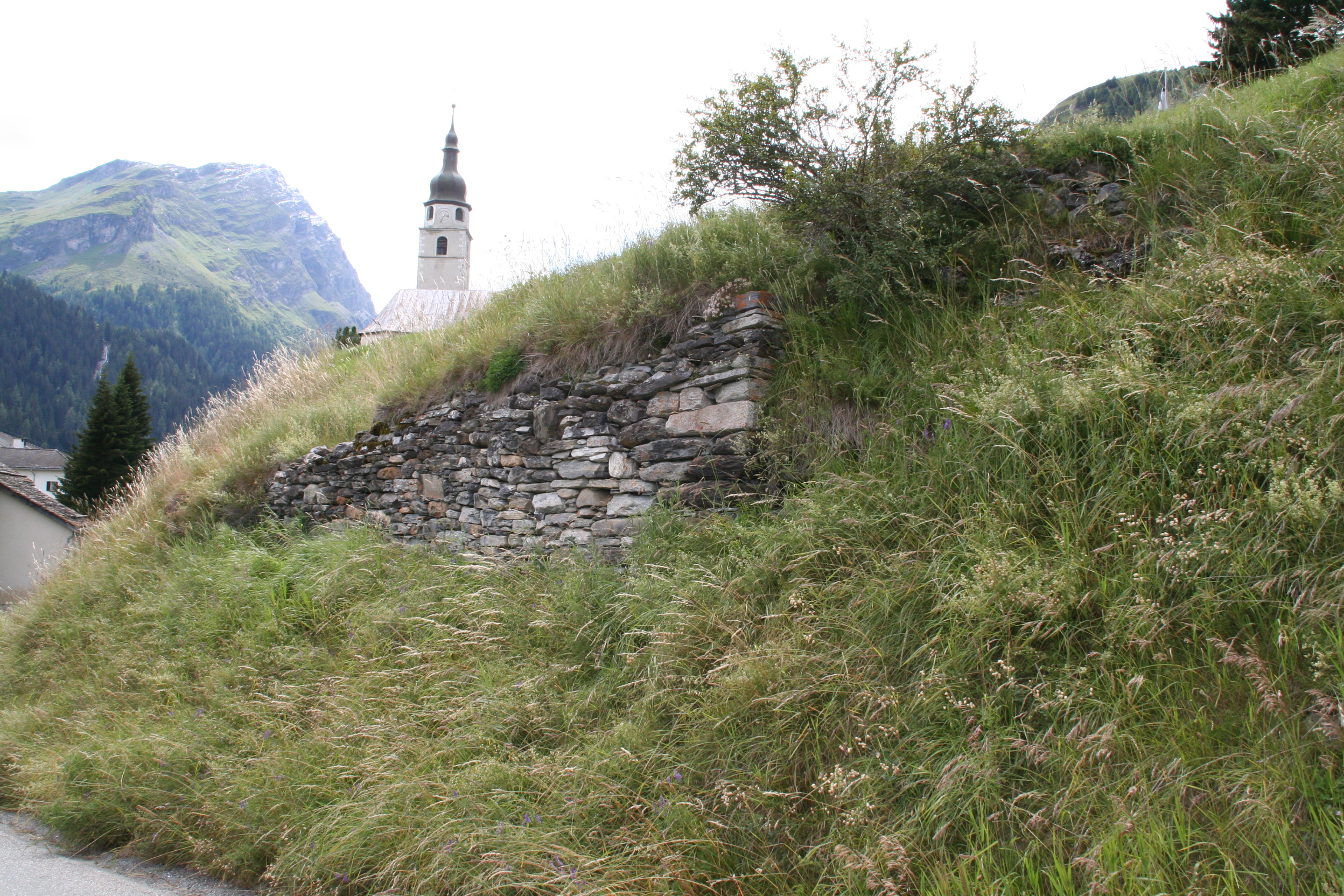 Fundamentreste der